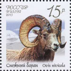 Снежный баран. Почтовая марка из серии «Фауна России. Дикие козлы и бараны»